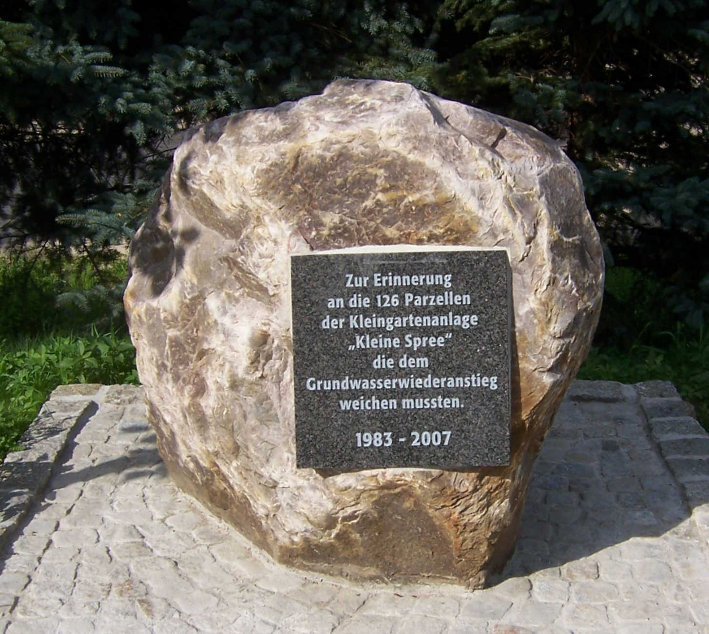 Gedenkstein zur Erinnerung an die Kleingärten, die in Burghammer (Gemeinde Spreetal, Sachsen) wegen des Grundwasserwiederanstiegs aufgegeben werden mussten. Die Inschrift lautet: Zur Erinnerung an die 126 Parzellen der Kleingartenanlage „Kleine Spree“ die dem Grundwasserwiederanstieg weichen mussten. 1983–2007 Map: 51° 28′ 40″ N, 14° 22′ 5″ E